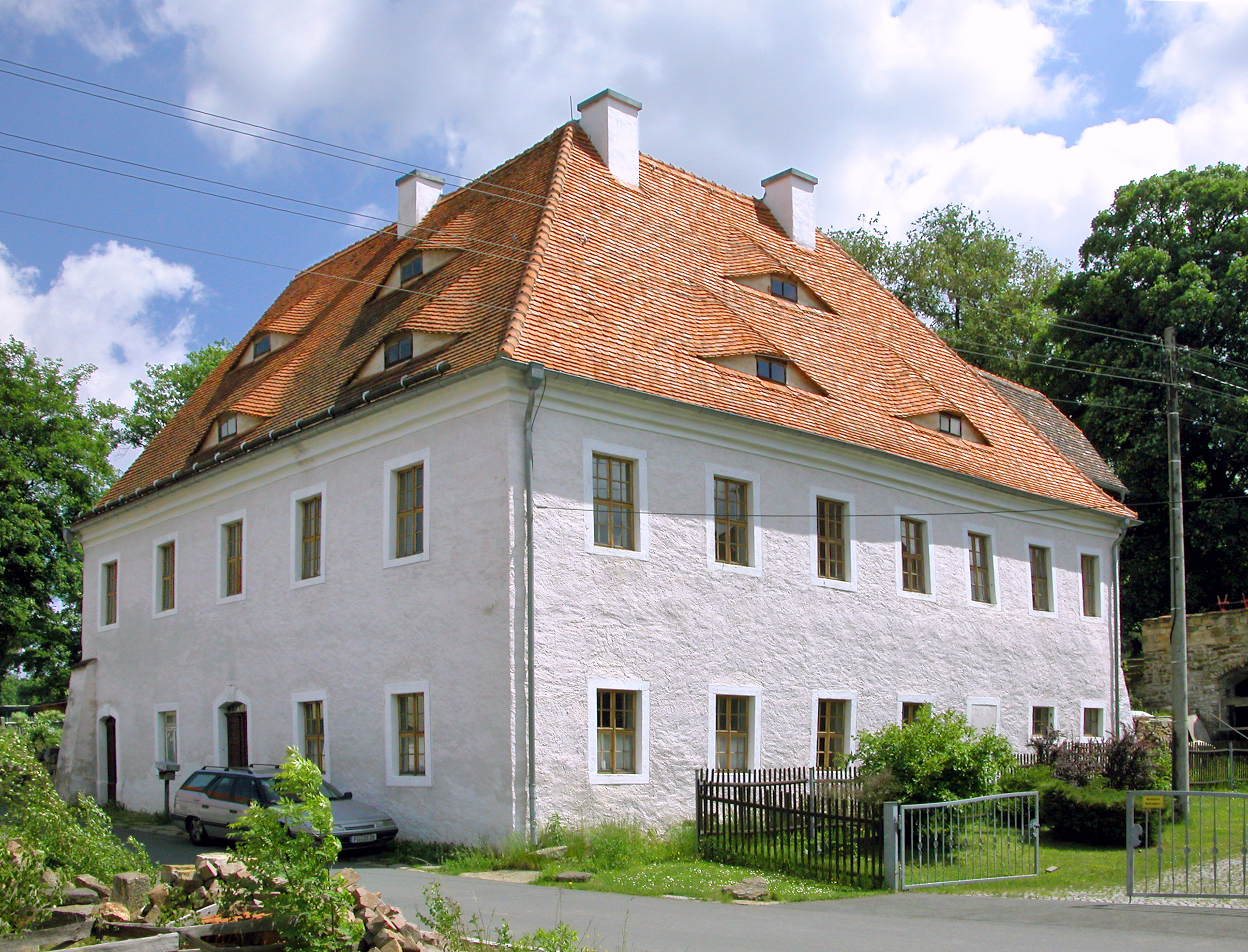 23.05.2009 09633 Oberschaar (Halsbrücke), Am Rodelandbach 4 ( GMP : 50.981240,13.409643): Rittergut Oberschaar, im 16. Jh. gebildet. Das Herrenhaus wurde 1744 für Friedrich Georg Ettengruber errichtet. In der DDR war im Haus der Kindergarten. In den 1990er Jahren privatisiert und saniert. [DSCN37671.TIF]20090523225DR.JPG(c)Blobelt